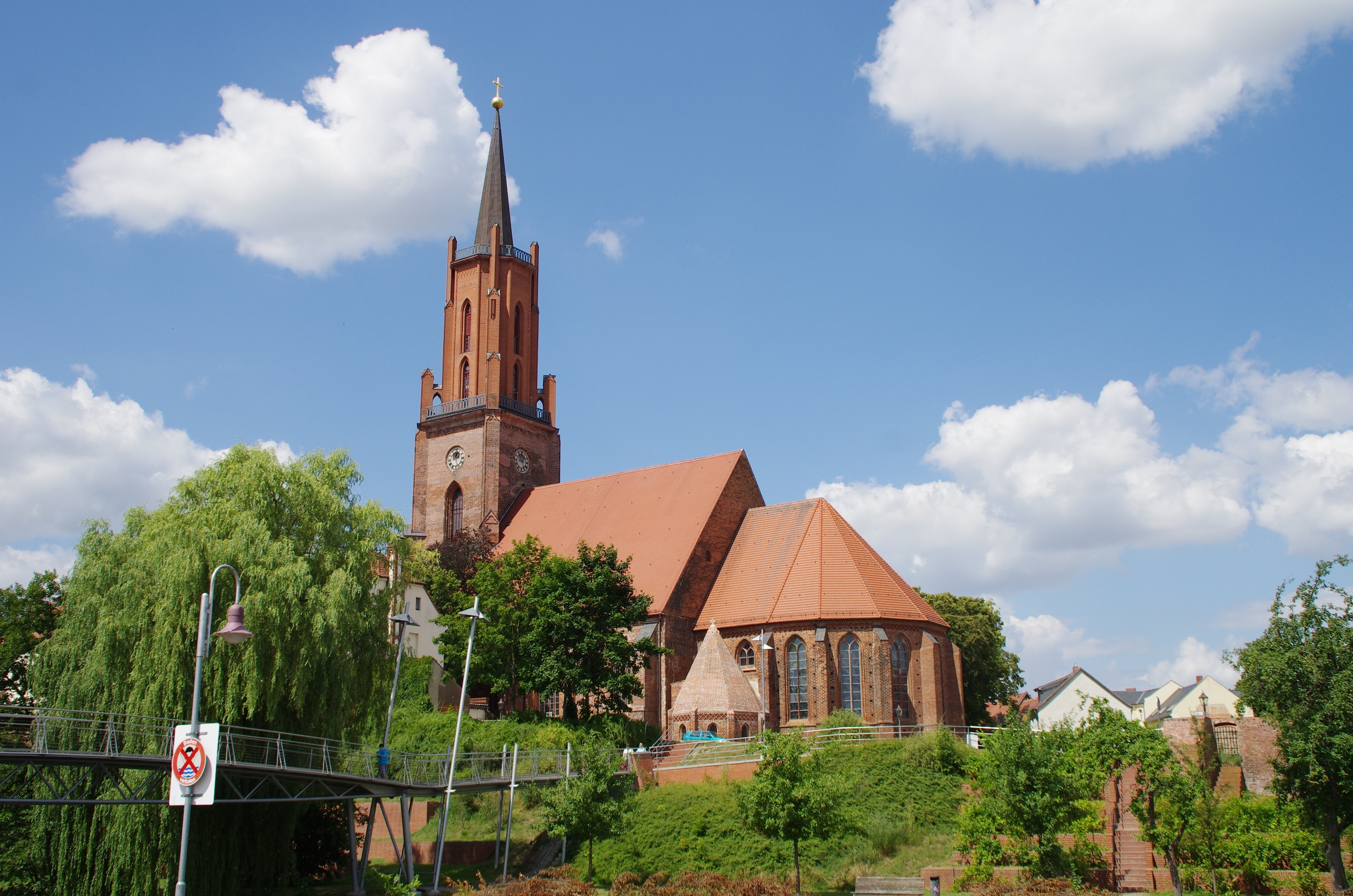 Rathenow in Brandenburg. Die Kirche steht unter Denkmalschutz.